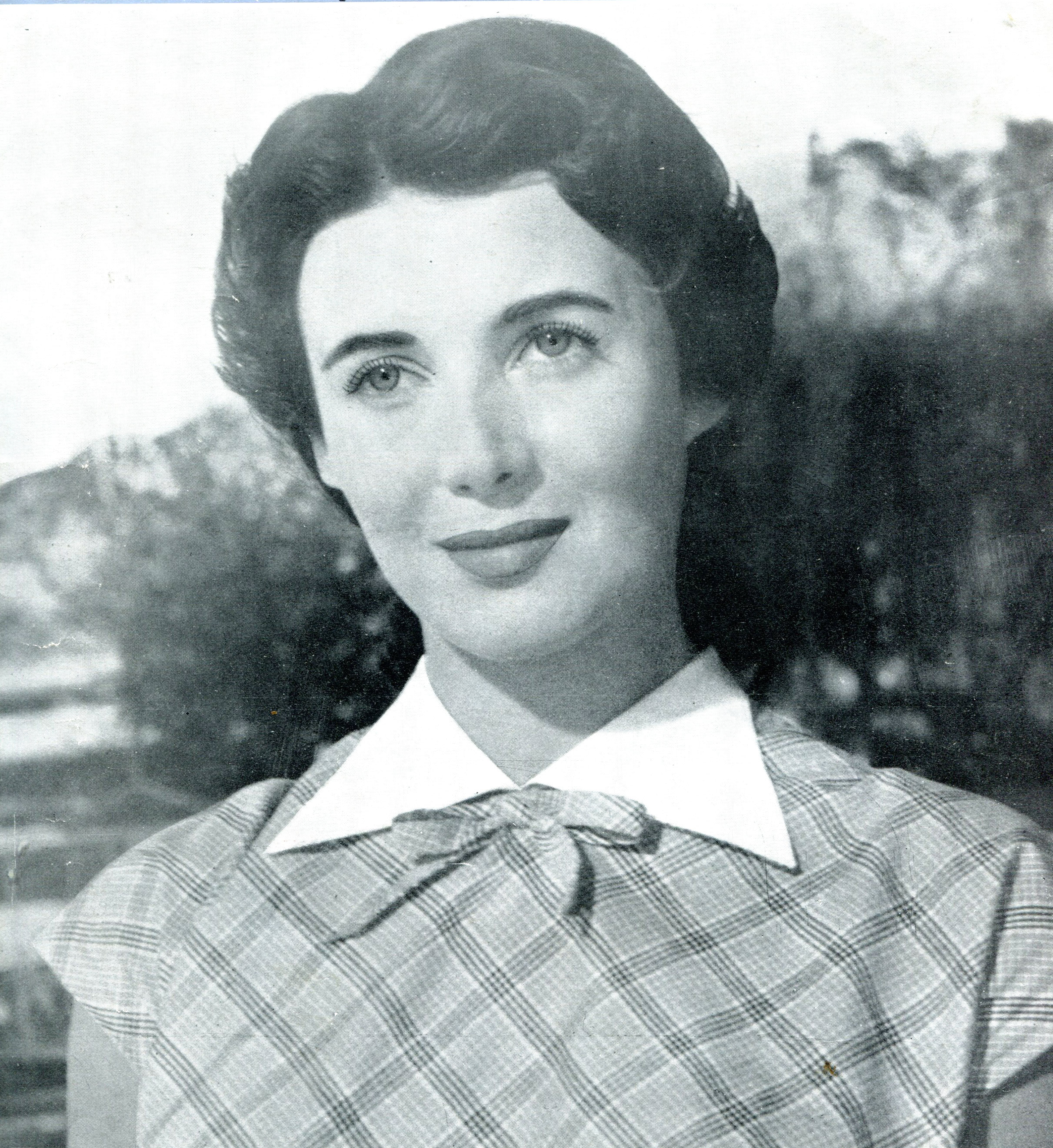 Myriam Bru in "Ti ho sempre amato" (Mario Costa, 1953)